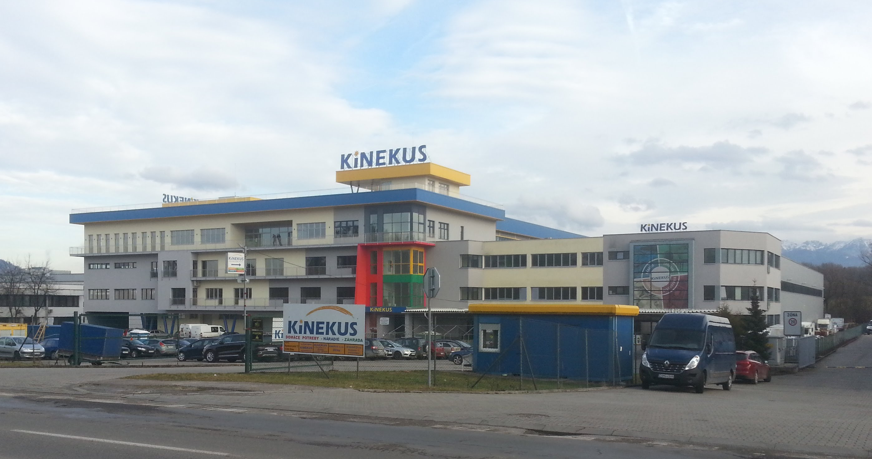 Distribučné stredisko spoločnosti Kinekus v Žiline.